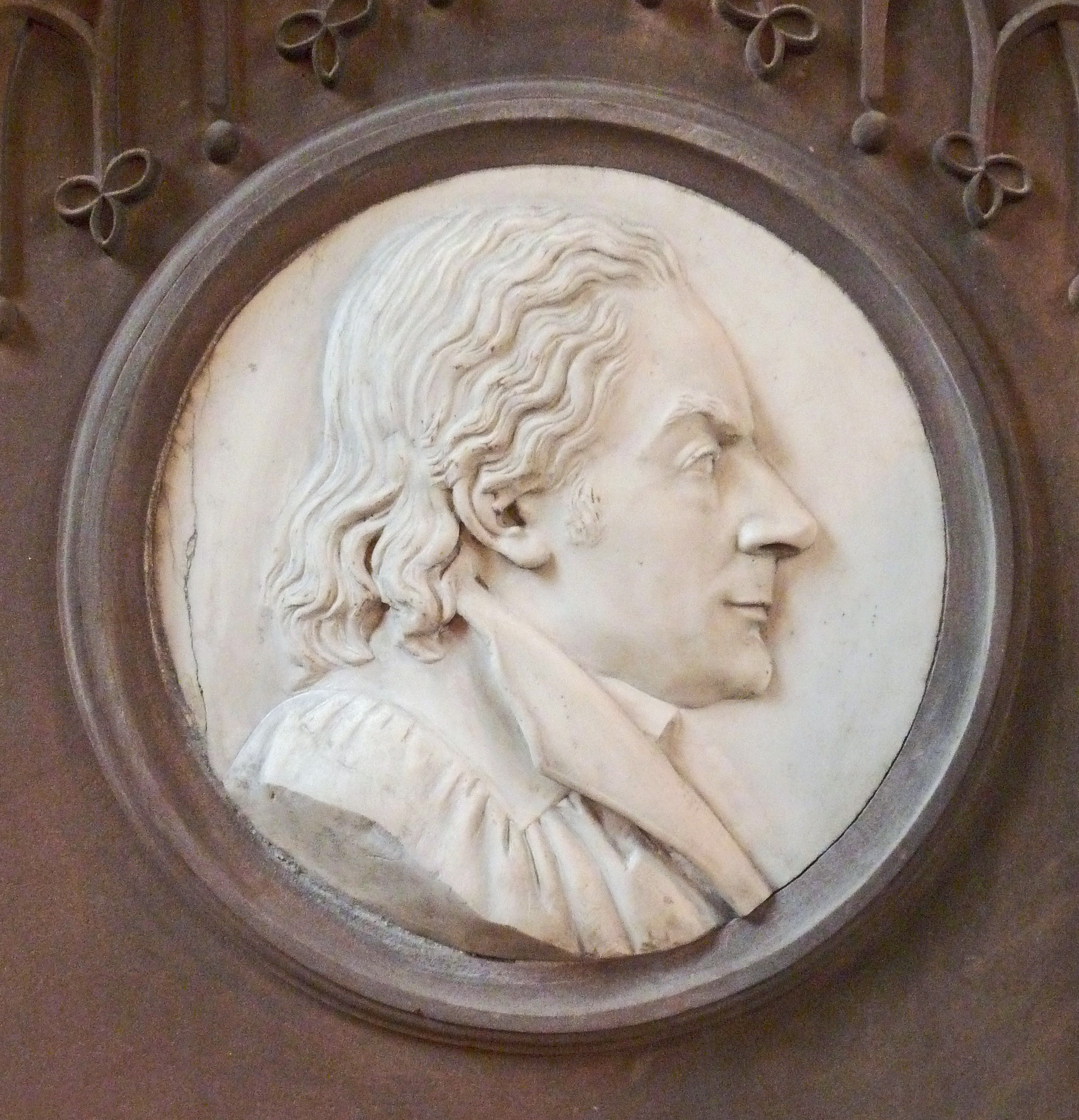 Strasbourg, Temple Neuf : monument à la mémoire de Jean Laurent Blessig (1747-1816), exécuté par Landolin Ohmacht. Médaillon d'après une gravure de Christophe Guérin.